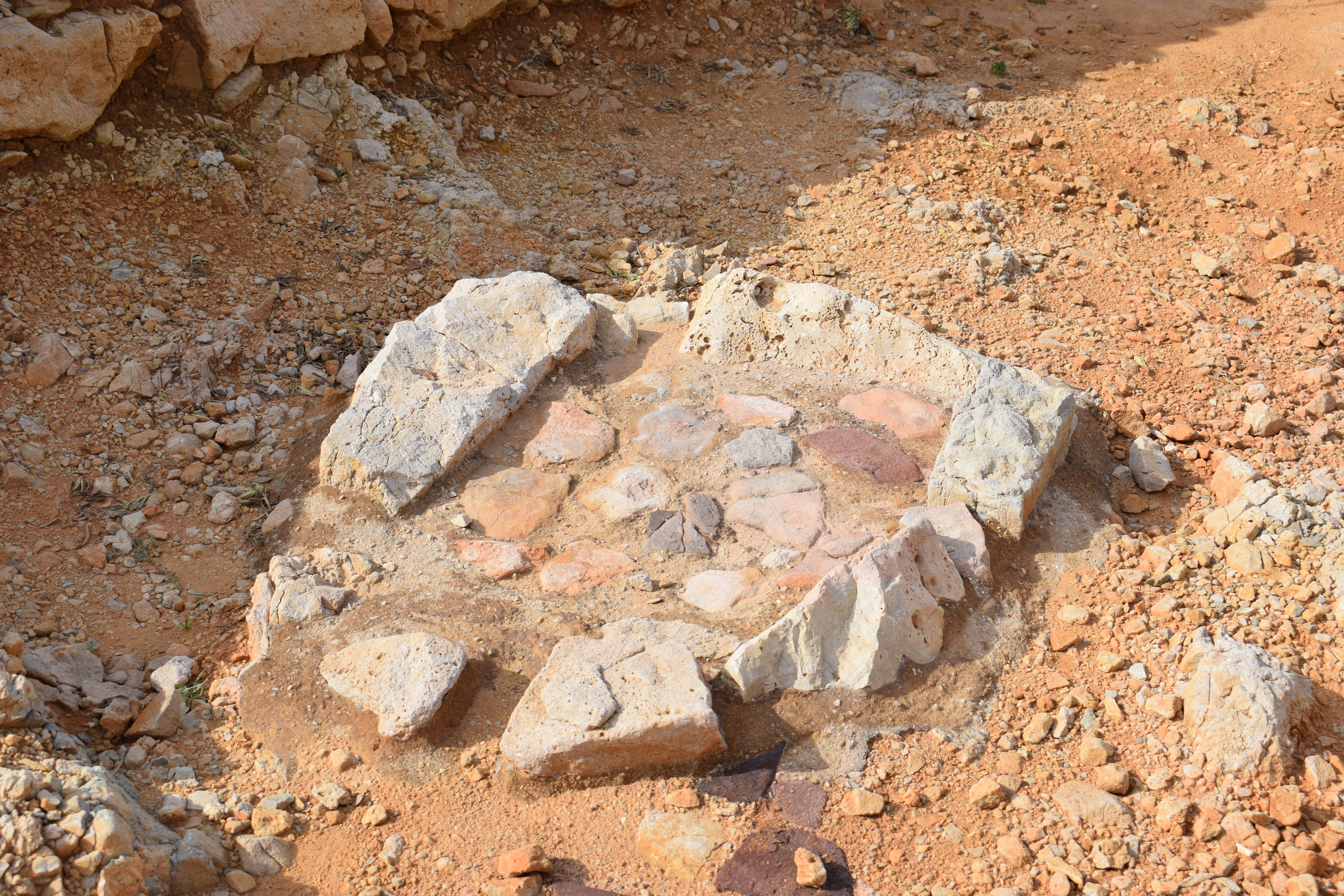 Feuerstelle in den Resten eines naviformen Hauses in der Küstensiedlung von Cala Morell.